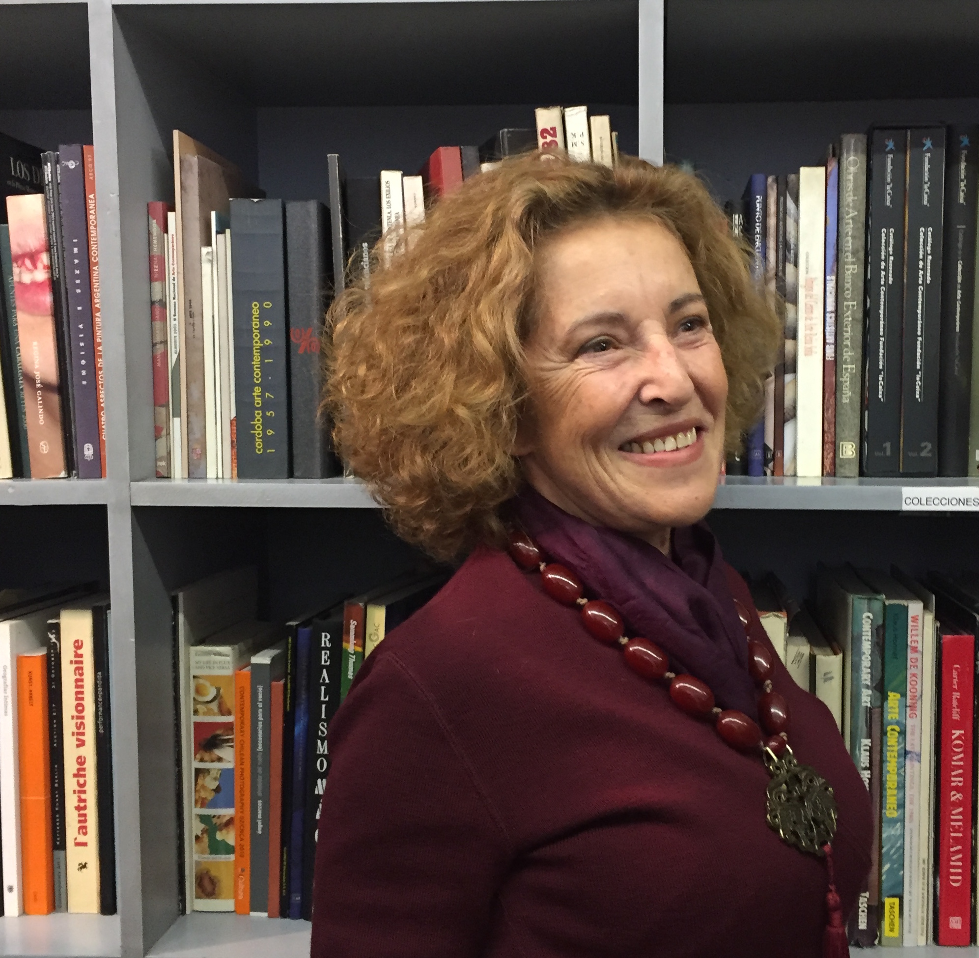 En inauguración en la galería Juana de Aizpuru